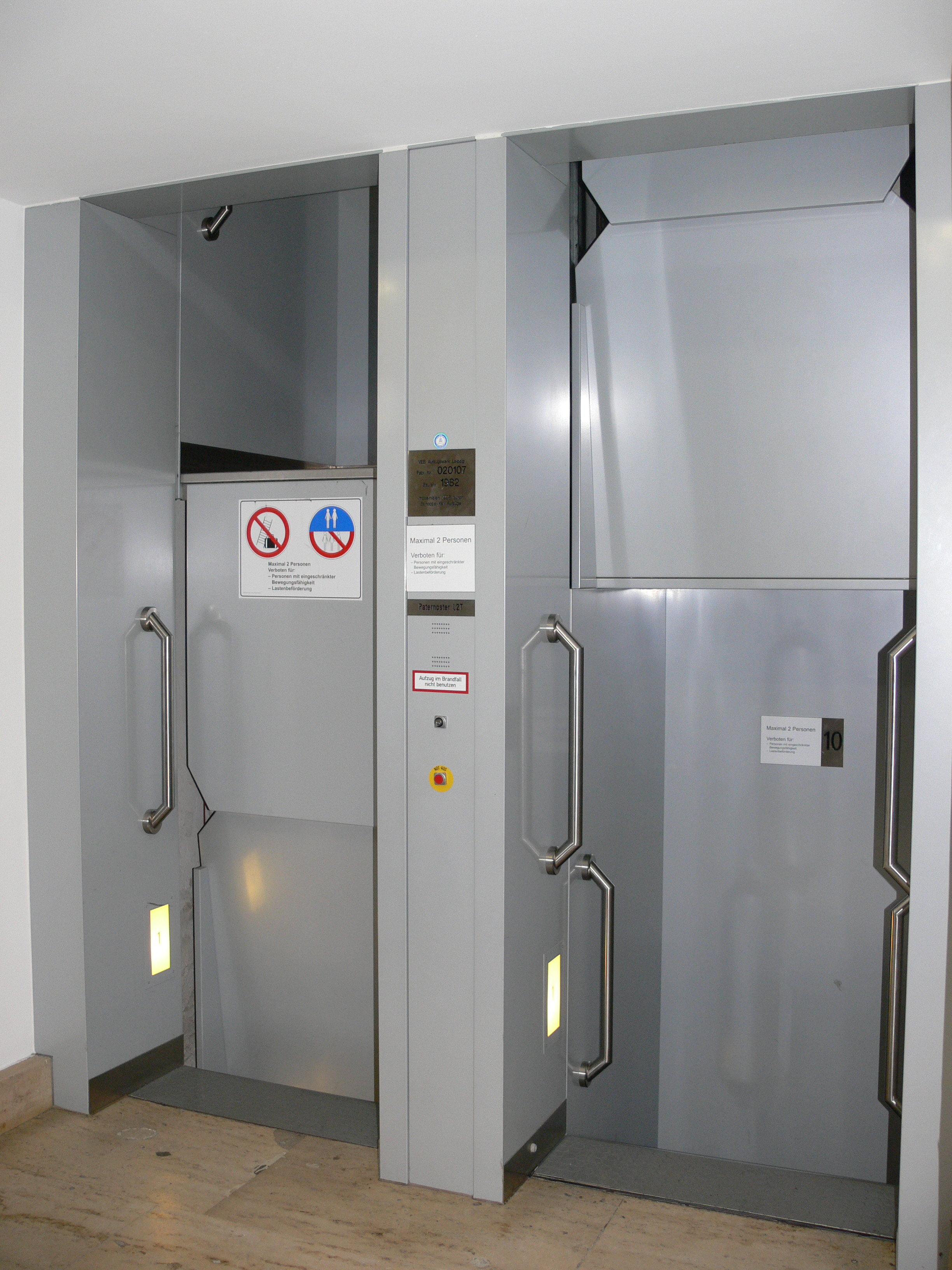 Paternoster (Aufzug) im Bundesministerium der Finanzen (Detlev-Rohwedder-Haus; früher Reichsluftfahrtministerium bzw. Haus der Ministerien der DDR), Wilhelmstraße 97/Leipziger Straße, Berlin.